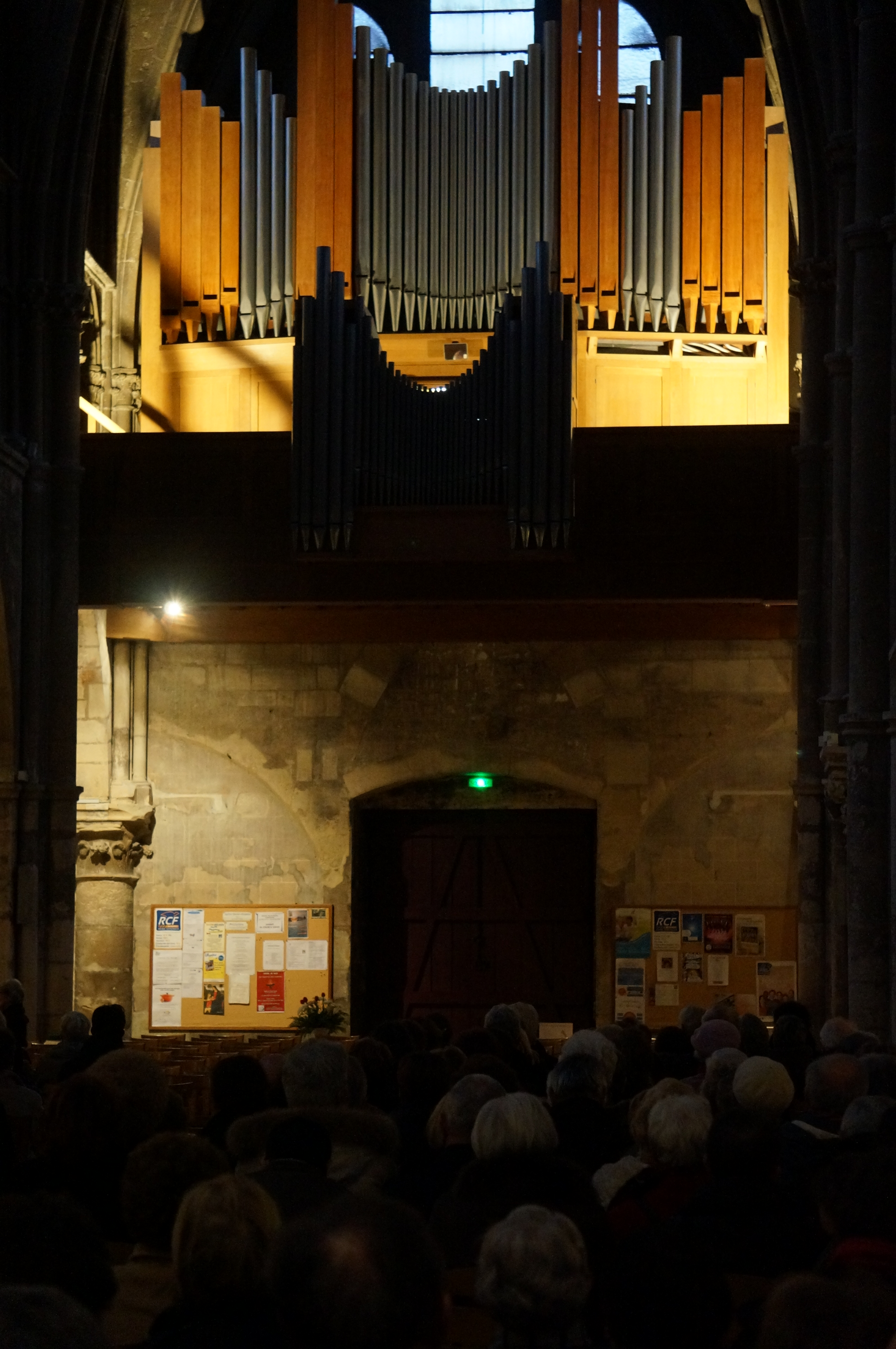 Orgel der Kirche Saint-Jacques (Reims); Konzert